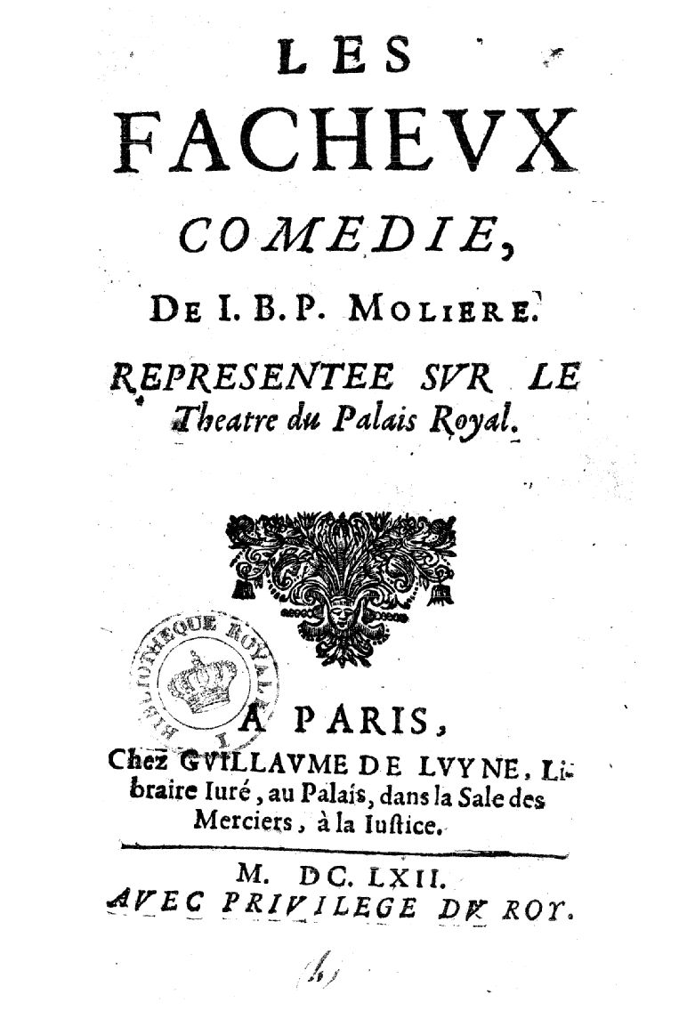 Титульная страница комедии Мольера "Докучные", издание 1662 года.